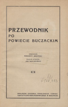 Вінтент Урбаньскі (Wincenty Urbański). Путівник по Бучацькому повіті (Przewodnik po powiecie buczackim)